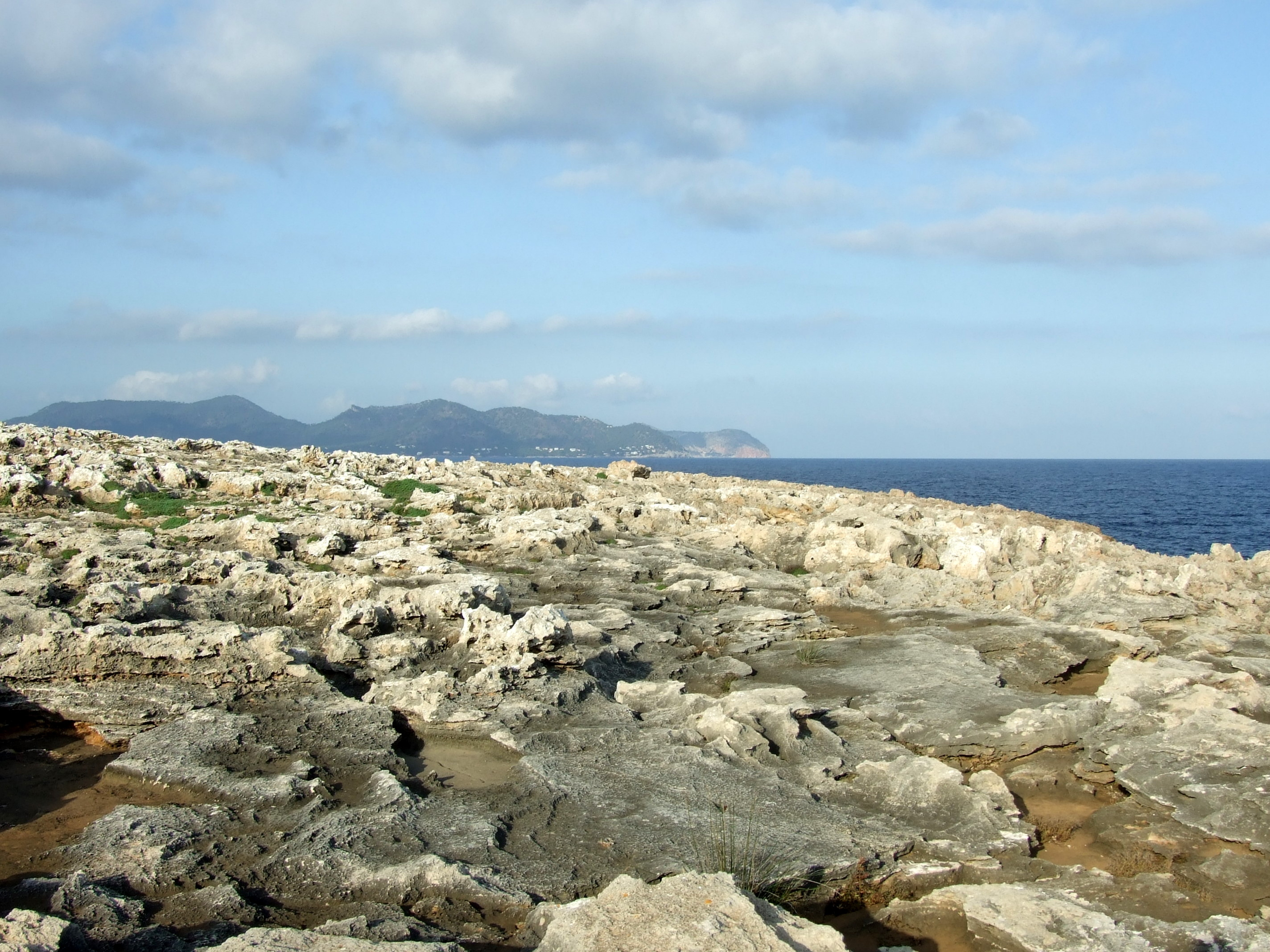 Bänke des Marès-Gesteins an der Küste von der Halbinsel Punta de n’Amer, Mallorca